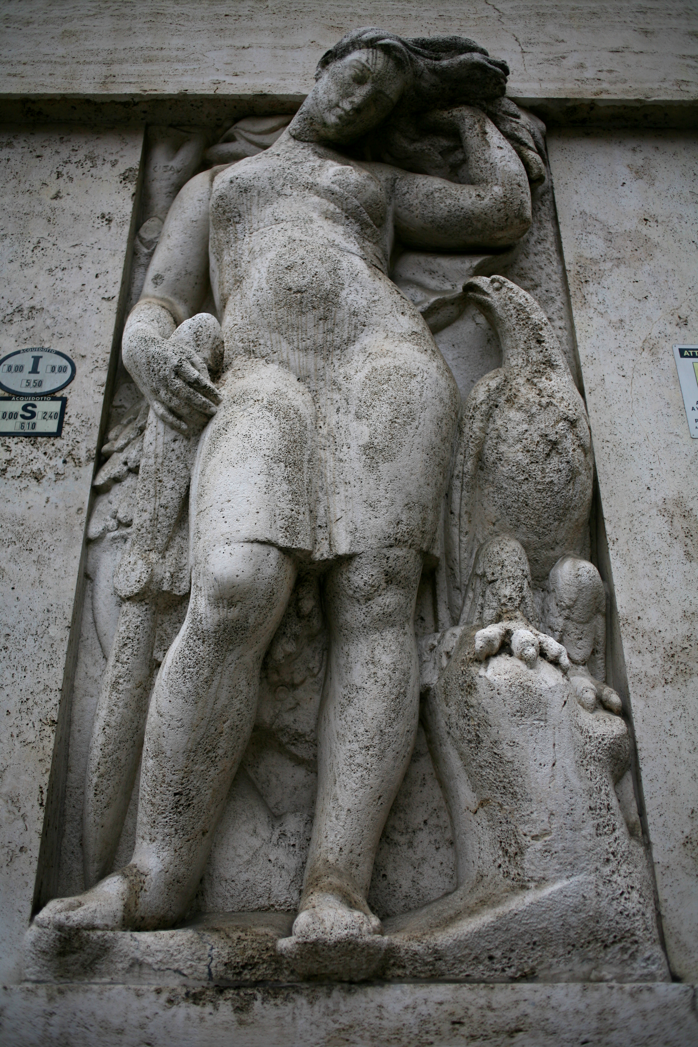 Geminiano Cibau statua 2 Palazzo Mezzanotte 1930 (Milano)- Figura femminile con un'elica d'aereo e un falco. L'opera è firmata in alto a sinistra: CIBAV